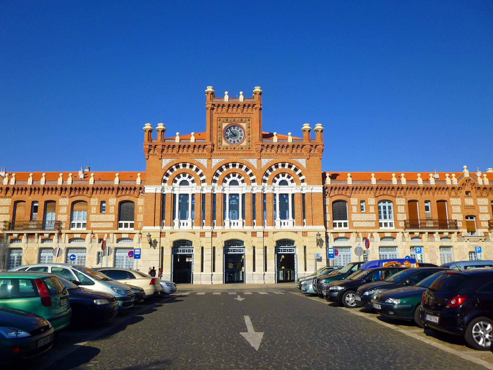 Estación de Ferrocarril de Aranjuez